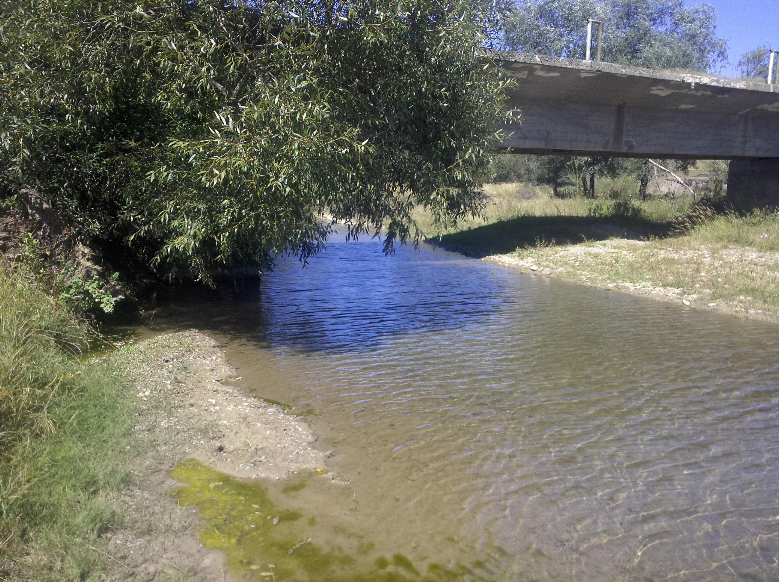 rio Nemţişor cerca del monasterio Cărbuna